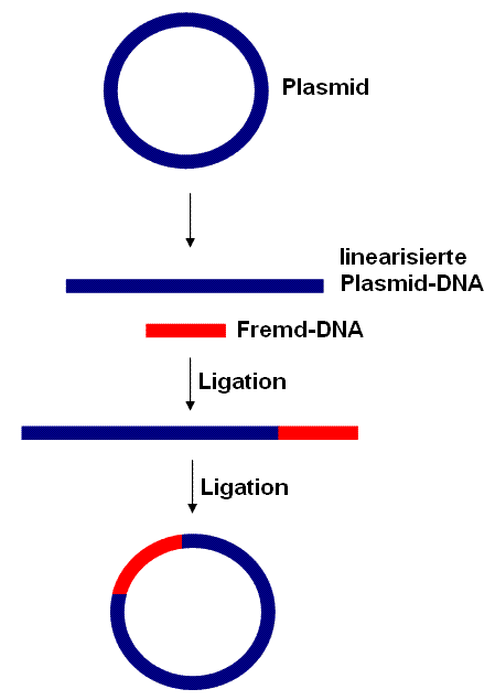 Ligation bei Fremd-DNA-Einbau (schematisch)